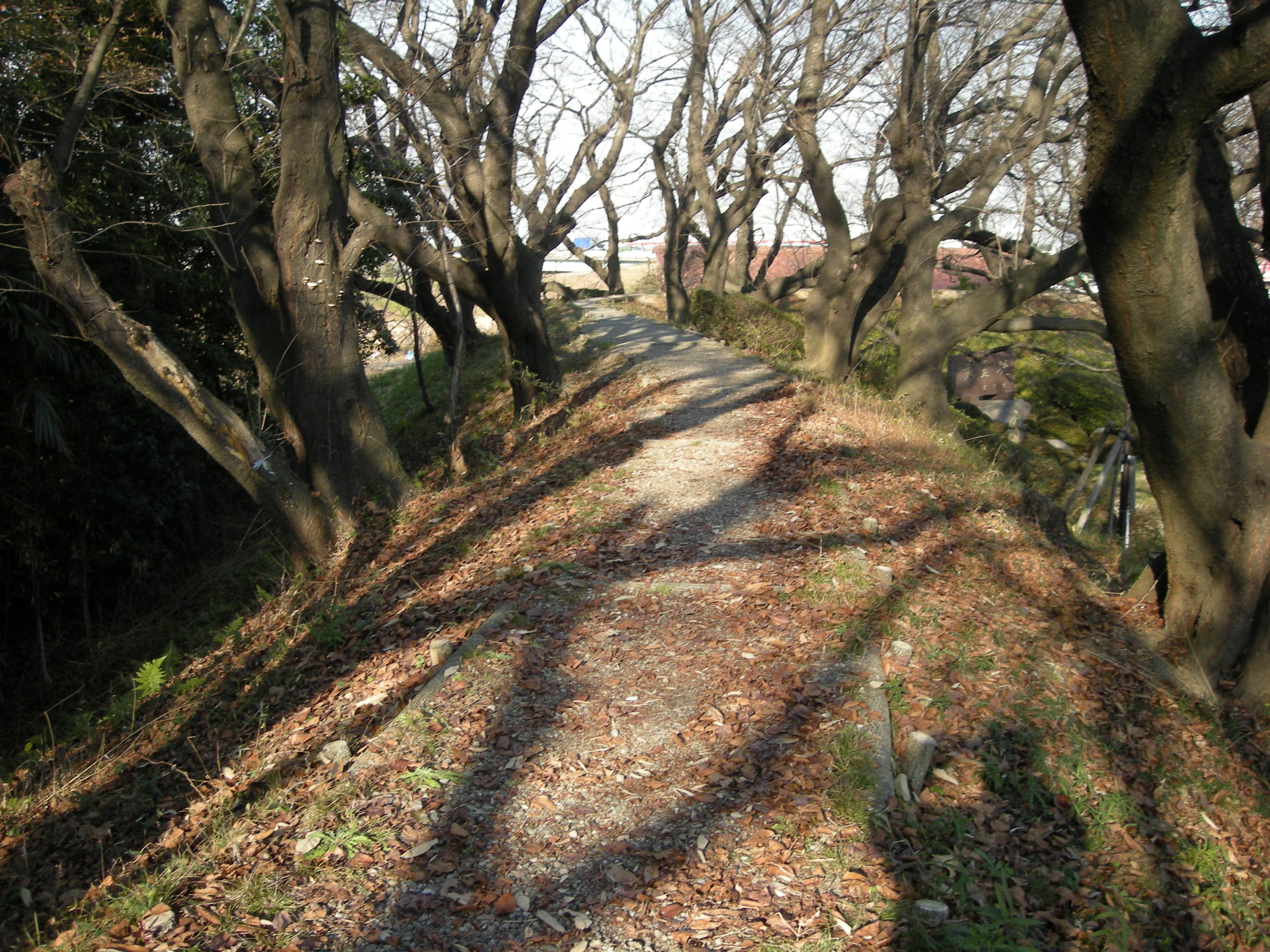 Koganedutsumi（黄金堤）